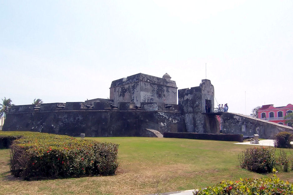 Fachada del Teatro de la Reforma